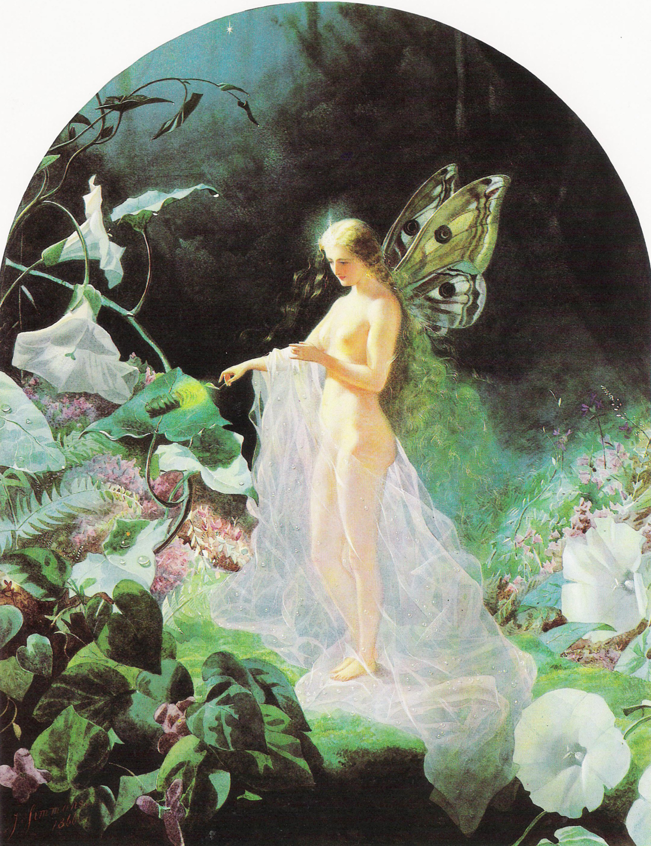 John Simmons (1823—1876). Titania.